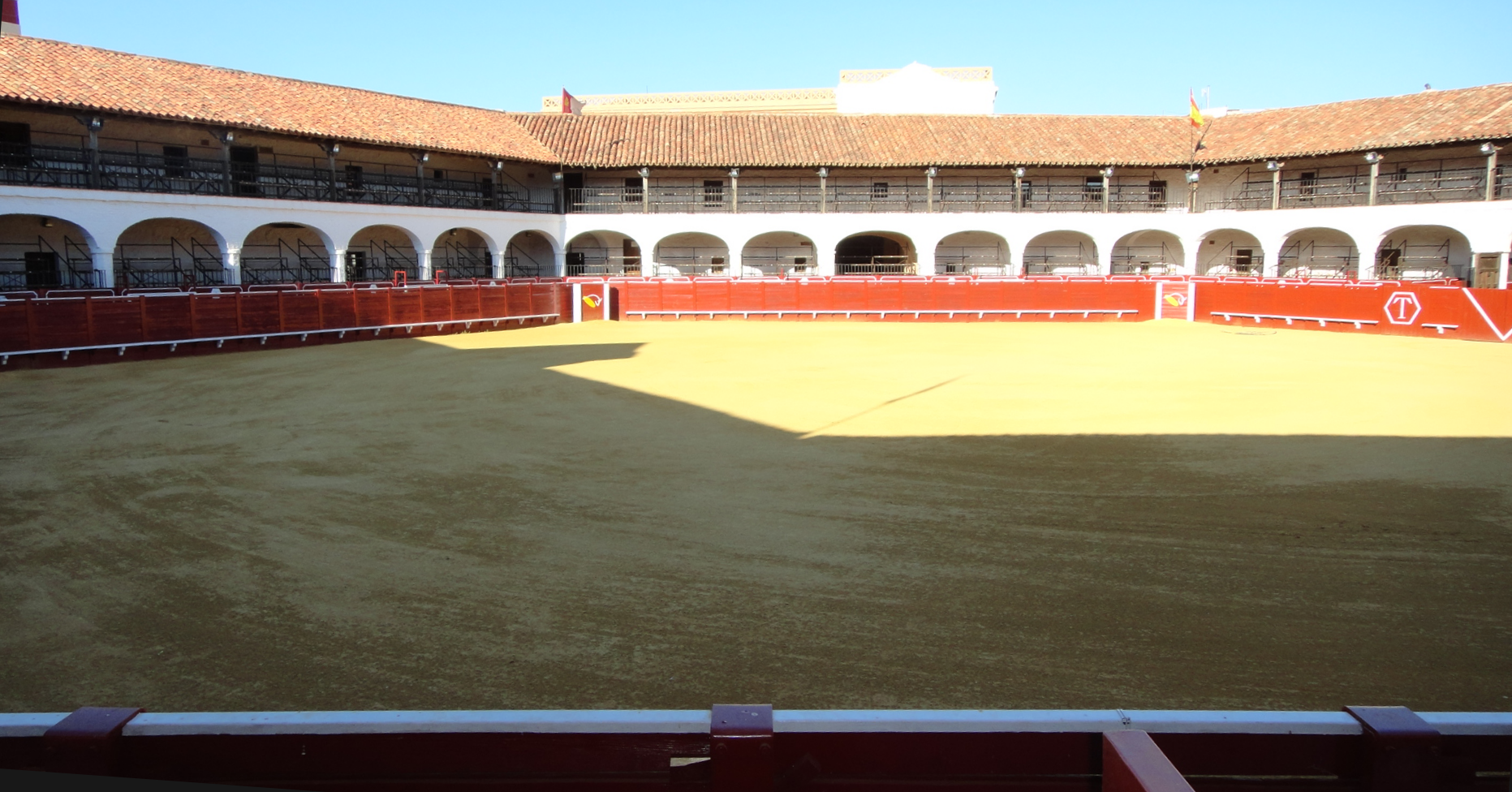 Plaza de toros de Almadén (provincia de Ciudad Real - España), denominada "Plaza Nueva"; cuya originalidad es su forma hexagonal.